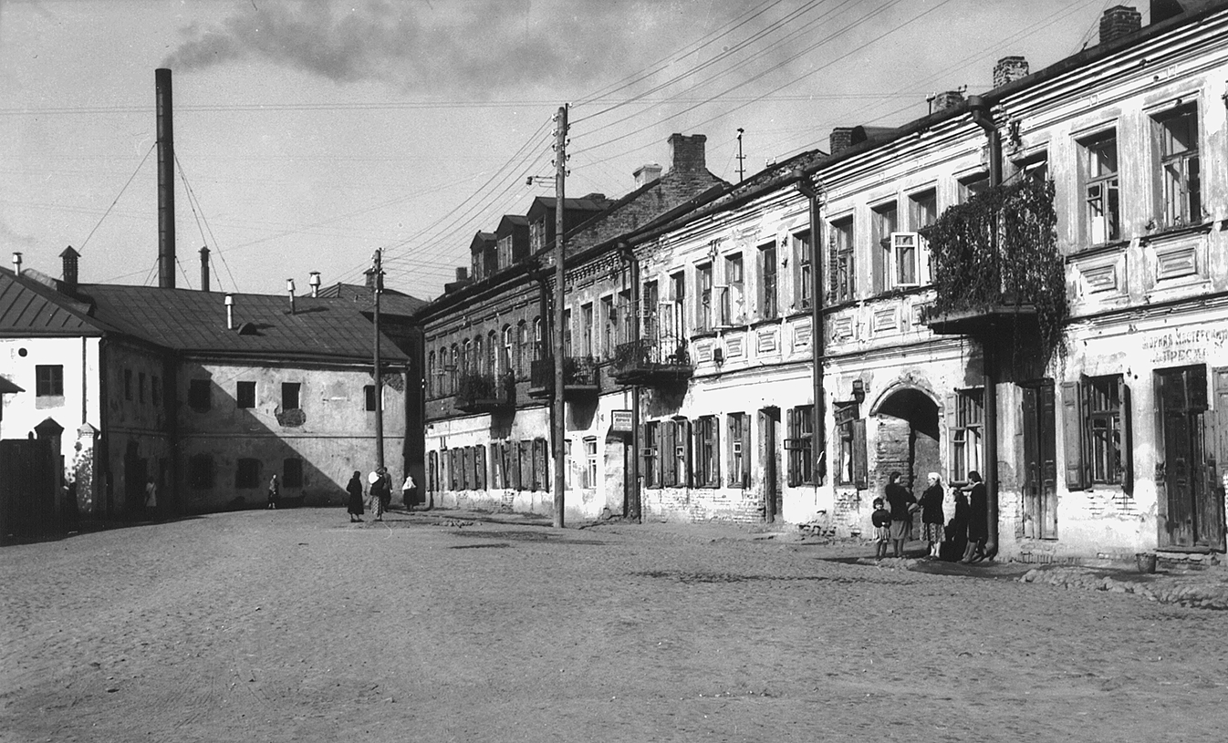 Беларуская (тарашкевіца): Менск (Miensk), Траецкае прадмесьце (Trajeckaje pradmieściе)